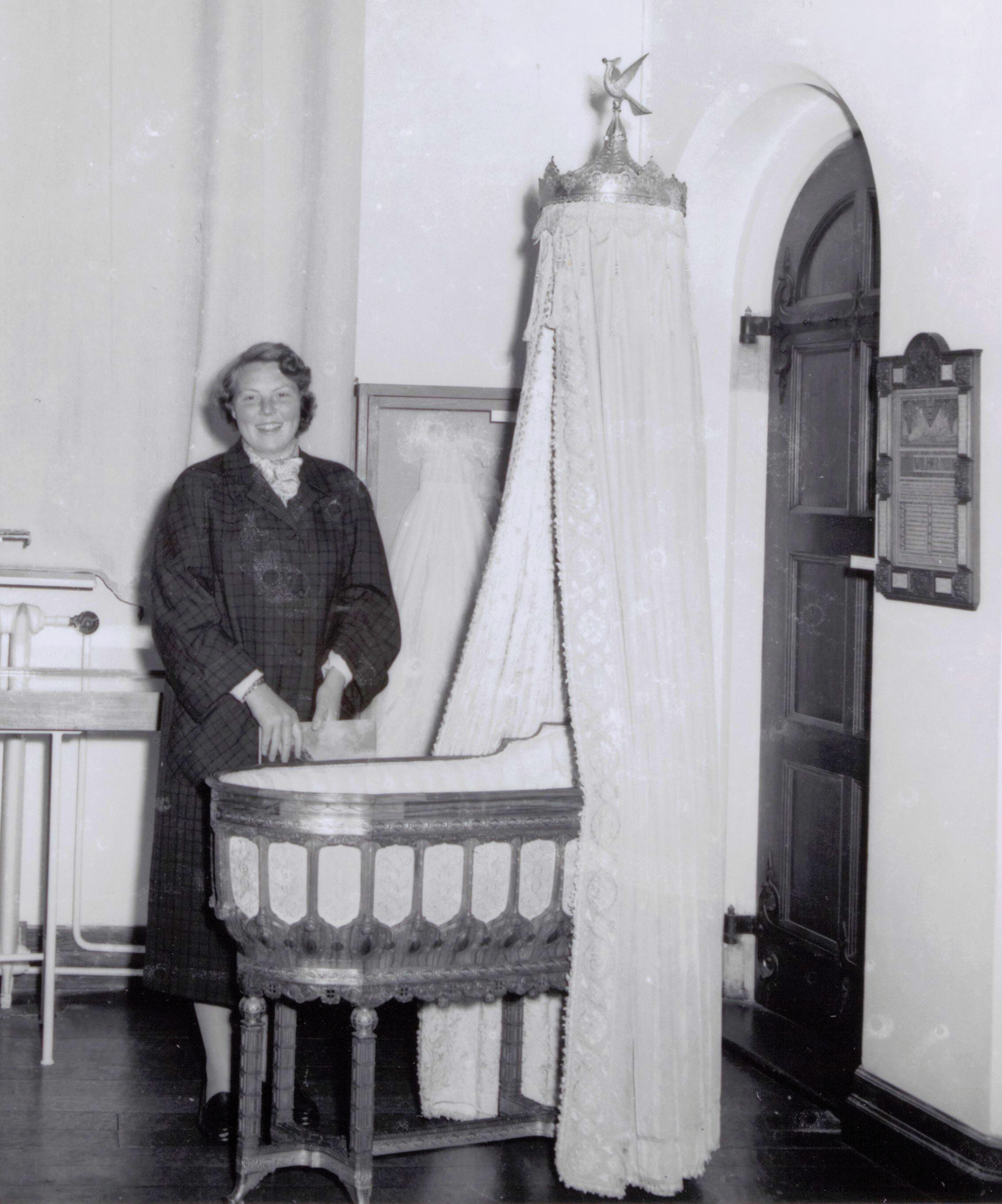 Collectie / Archief : Fotocollectie Rijksvoorlichtingsdienst Eigen - Prinses Beatrix bij de wieg waarin generaties Oranjes als baby hebben gelegen Reportage / Serie : Serie Afdrukken ANEFO [RVD Eigen zonder caption] Beschrijving : Collectie Fotocollectie Rijksvoorlichtingsdienst Eigen, fotonummer 156-0323 This file has been extracted from another file: Collectie Fotocollectie Rijksvoorlichtingsdienst Eigen, fotonummer 156-0323, Bestanddeelnr 156-0323.jpg Datum : 1956 Fotograaf : Afdruk zonder naam fotograaf / Anefo Auteursrechthebbende : Nationaal Archief Materiaalsoort : Foto (zwart/wit) Nummer archiefinventaris : bekijk toegang 2.24.10.02 Bestanddeelnummer : 156-0323